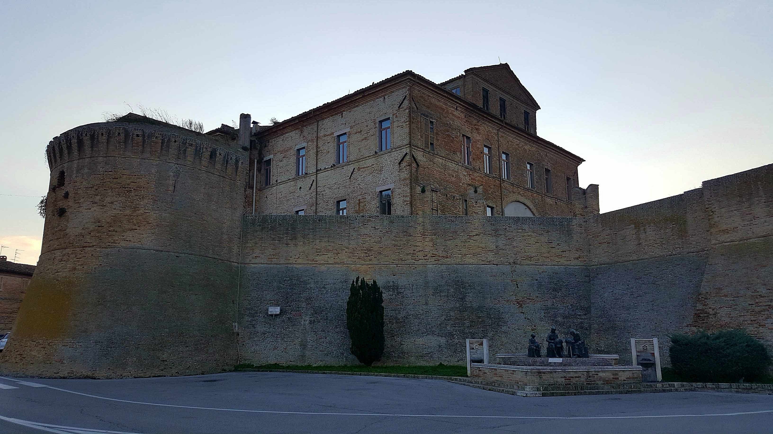 Offida, immagine delle Mura di cinta la costruzione risale al sec. XII-XIII. In basso sulla destra si scorge il "Monumento alle merlettaie".